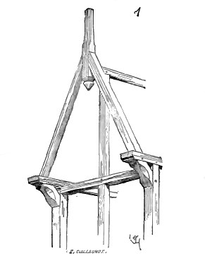 «Terme de charpenterie appliqué à la maçonnerie. [...] Le gâble est originairement la réunion, à leur sommet, de deux pièces de bois inclinées. Le gâble d'une lucarne comprend deux arbalétriers assemblés dans un bout de poinçon et venant reposer au pied, à l'extrémité de deux semelles (1).»